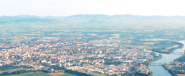 Panorama de Villefranche-sur-Saône.